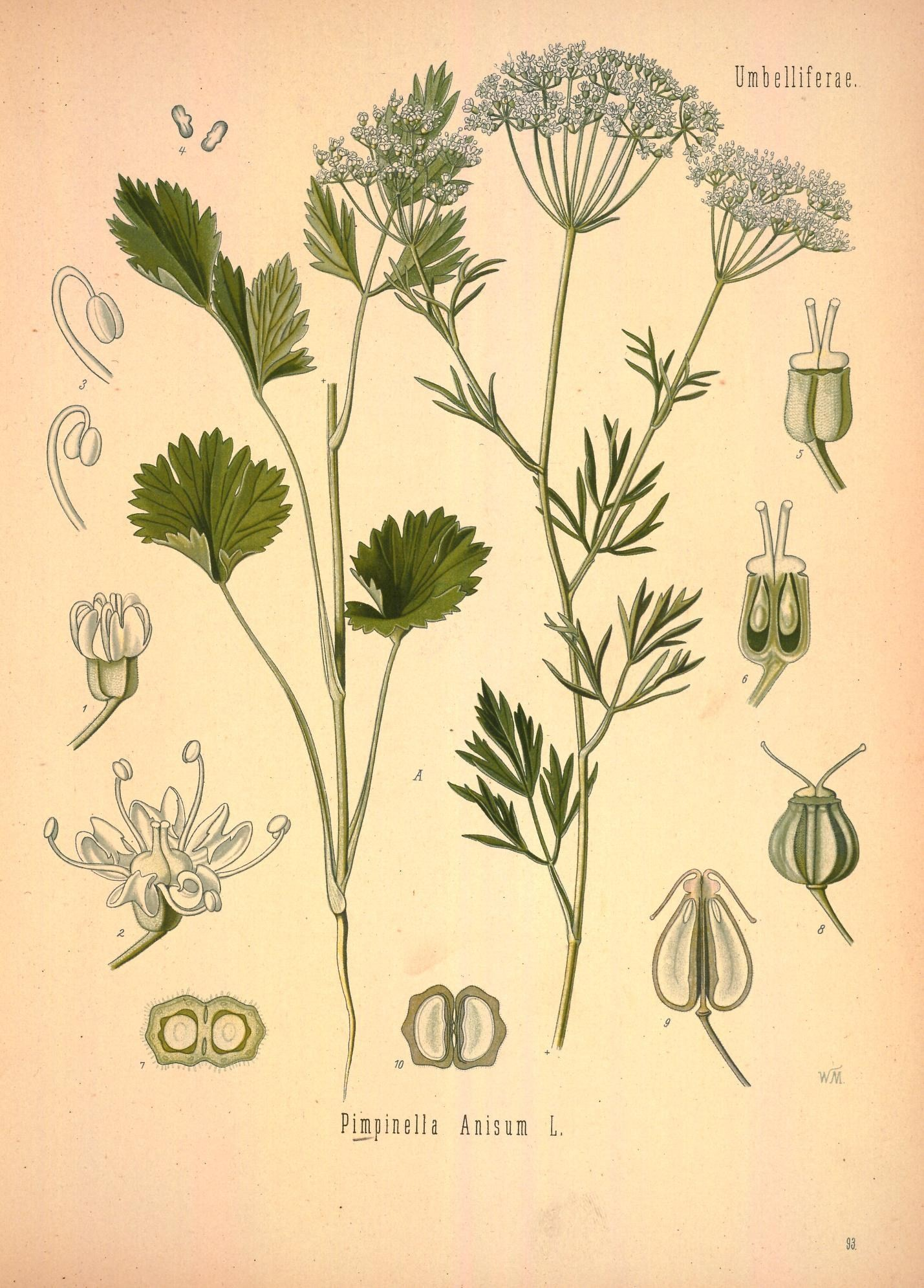 Anis. A Pflanze in natürl. Grösse; 1 Blüthenknospe, vergrössert; 2 Blüthe, desgl.; 3 Staubgefässe, desgl.; 4 Pollen, desgl.; 5 Fruchtknoten, desgl.; 6 derselbe im Längsschnitt, desgl.; 7 derselbe im Querschnitt, desgl.; 8 Frucht, desgl.; 9 dieselbe im Längsschnitt, desgl. 10 dieselbe im Querschnitt, desgl.